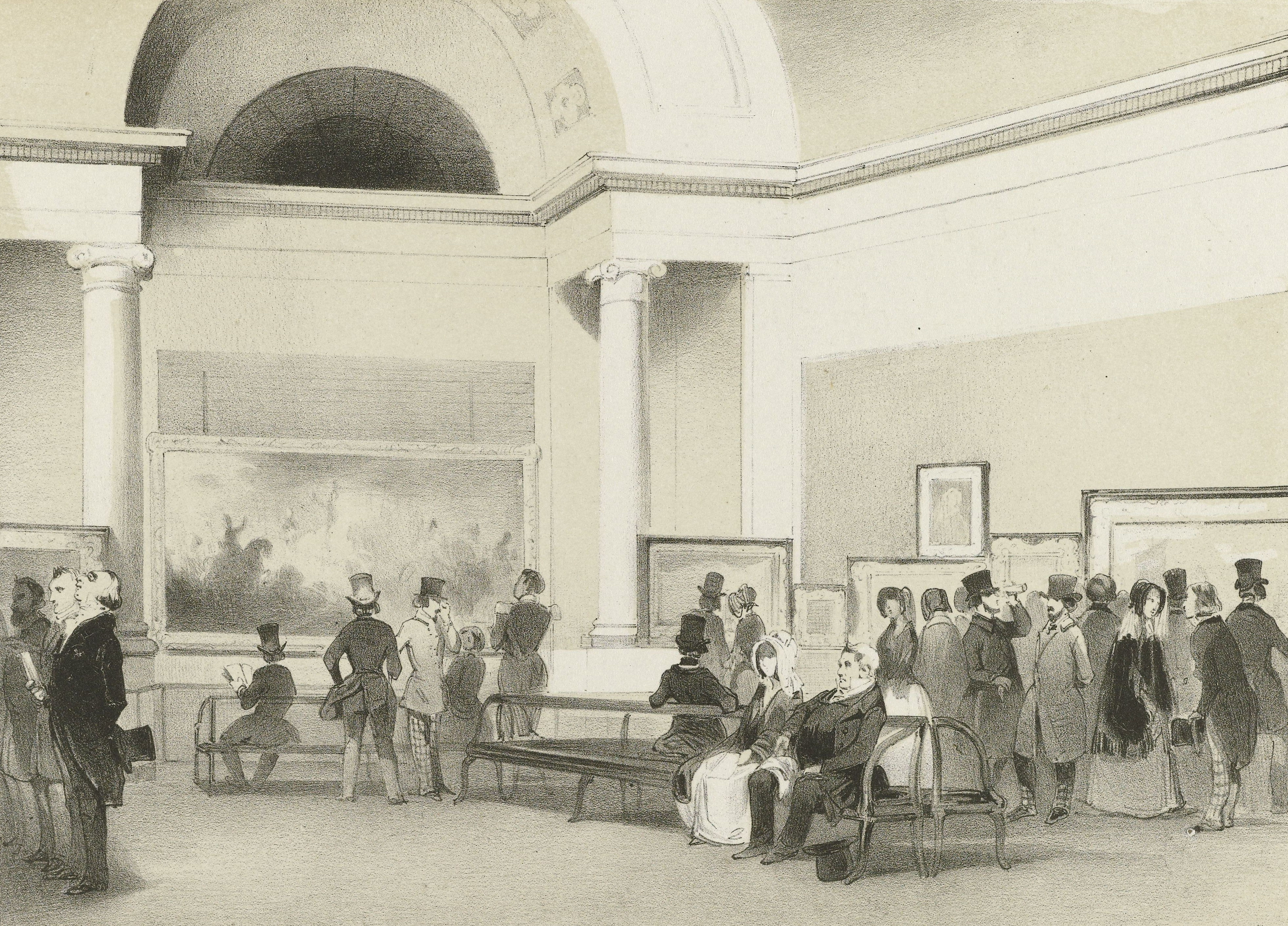 Tentoonstelling van Levende Meesters in Den Haag (1845)